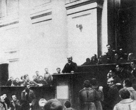 В.И.Ленин выступает в Таврическом дворце.